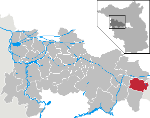 Falkensee in Brandenburg (Country) - District Havelland